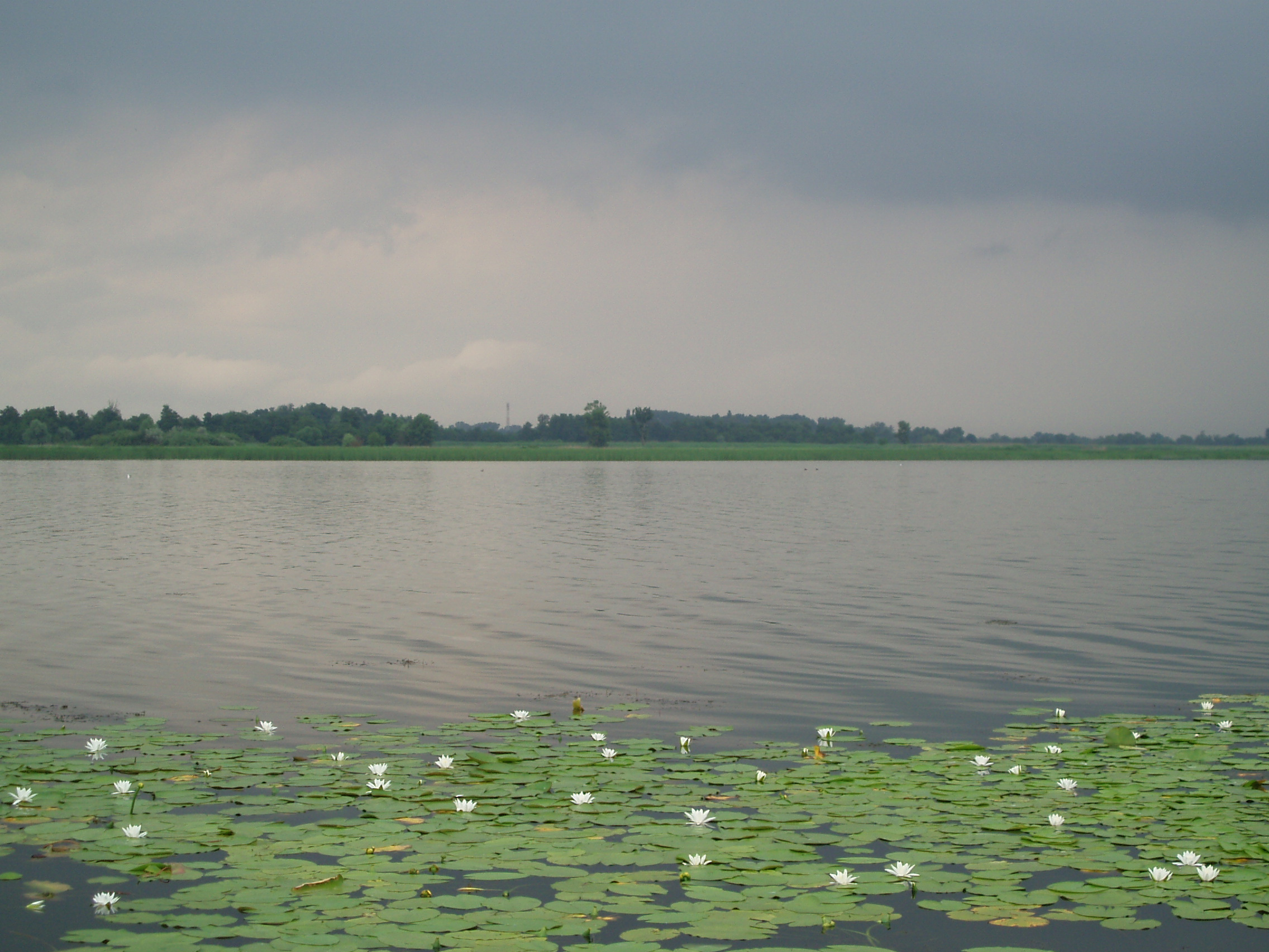 Збурьевский Кут, залив нижнего Днепра, на берегу которого расположено село Збурьевка.